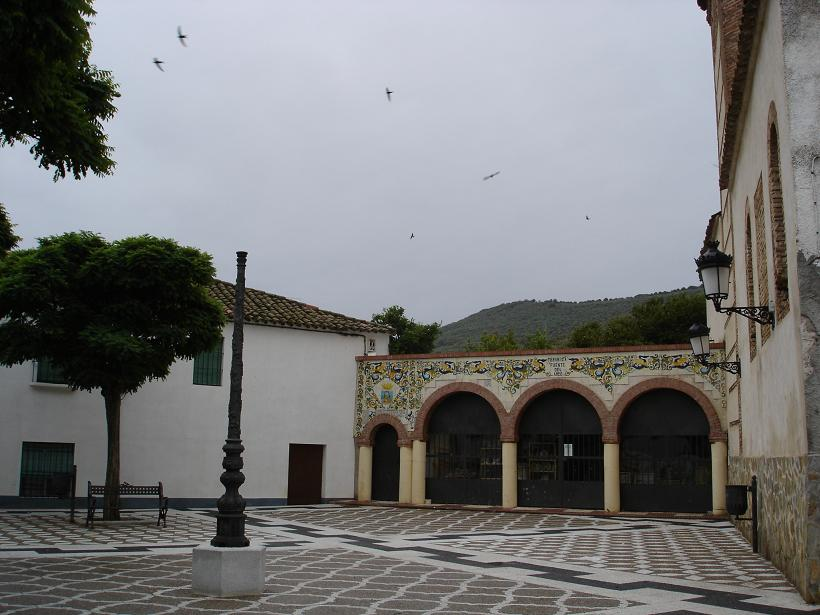 Plaza de España, en Fuente del Arco (Badajoz).